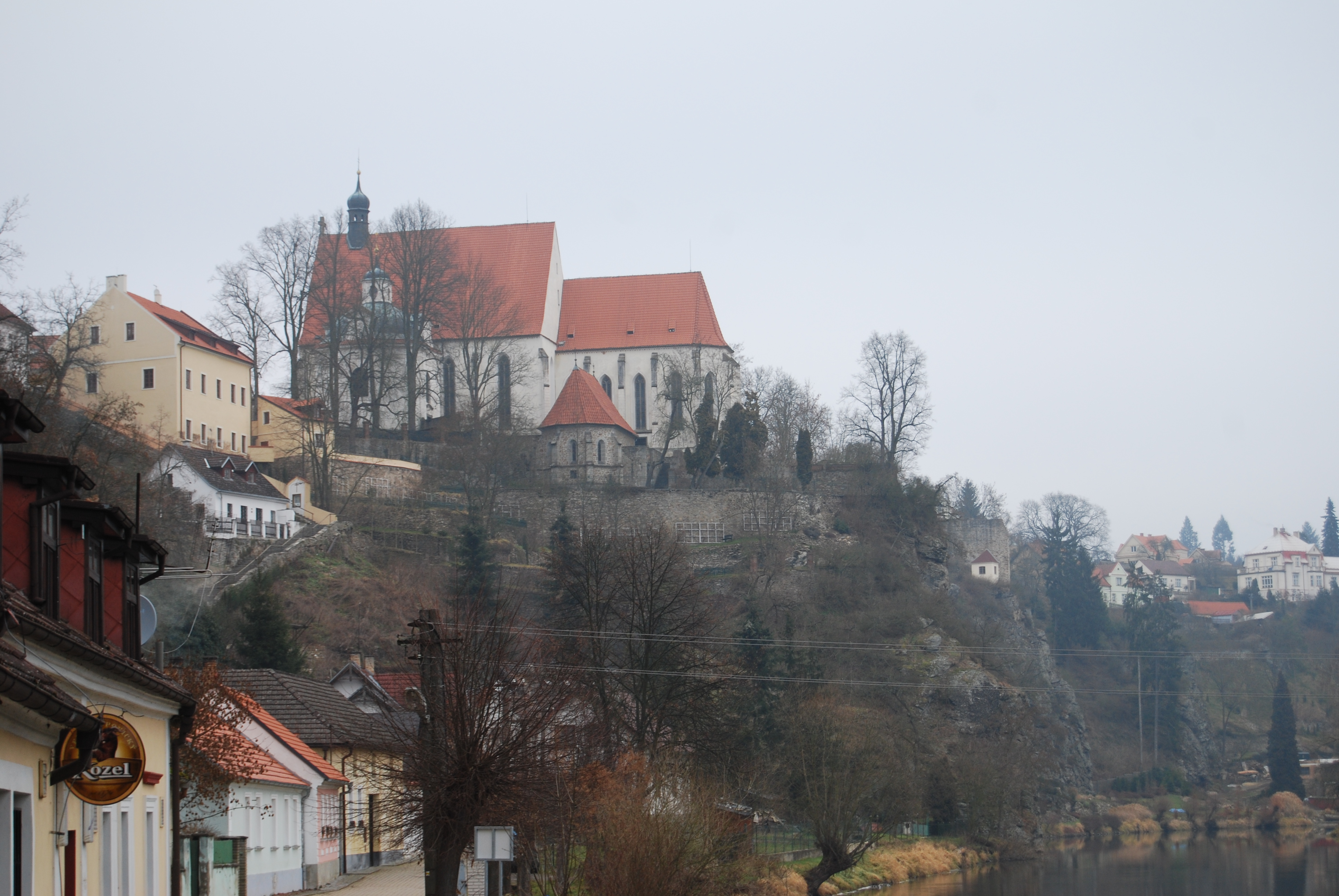 Pohled ze Zářečí směrem k františkánskému klášteru a kostelu Nanebevzetí Panny Marie. Bechyně (německy Bechin nebo Beching) v okrese Tábor v Jihočeském kraji. Česká republika.